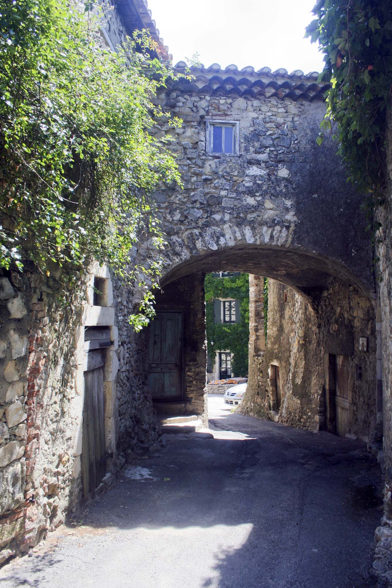 Cliousclat (Drôme, France), une ruelle